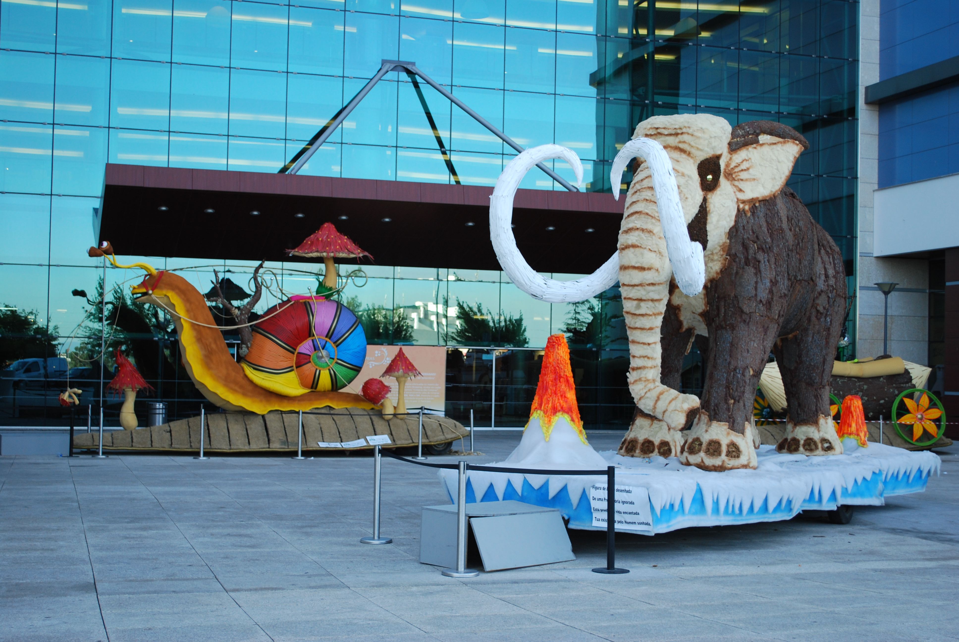 Chars utilisés lors des Cavalhadas de Vildemoinhos 2010, exposés devant le Palácio do Gelo à Viseu